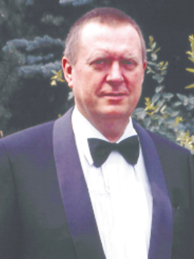 Prof. Dr. med. Claus Claussen (* 1939), Neurootologe